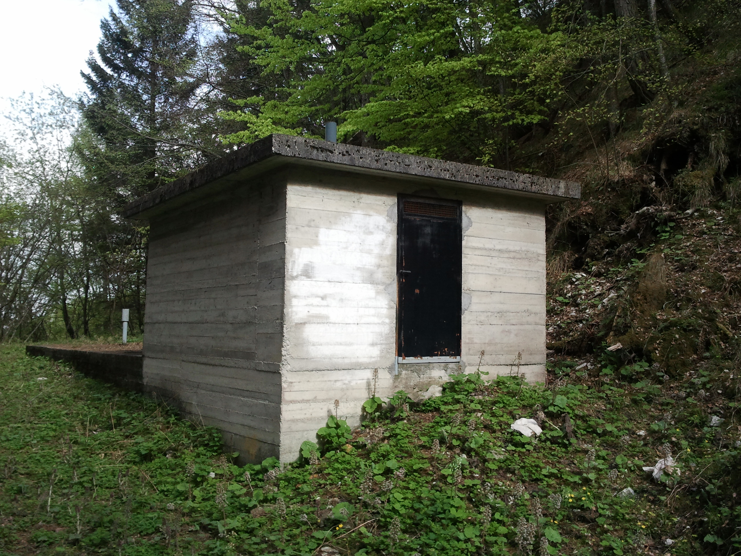 Impianto recente